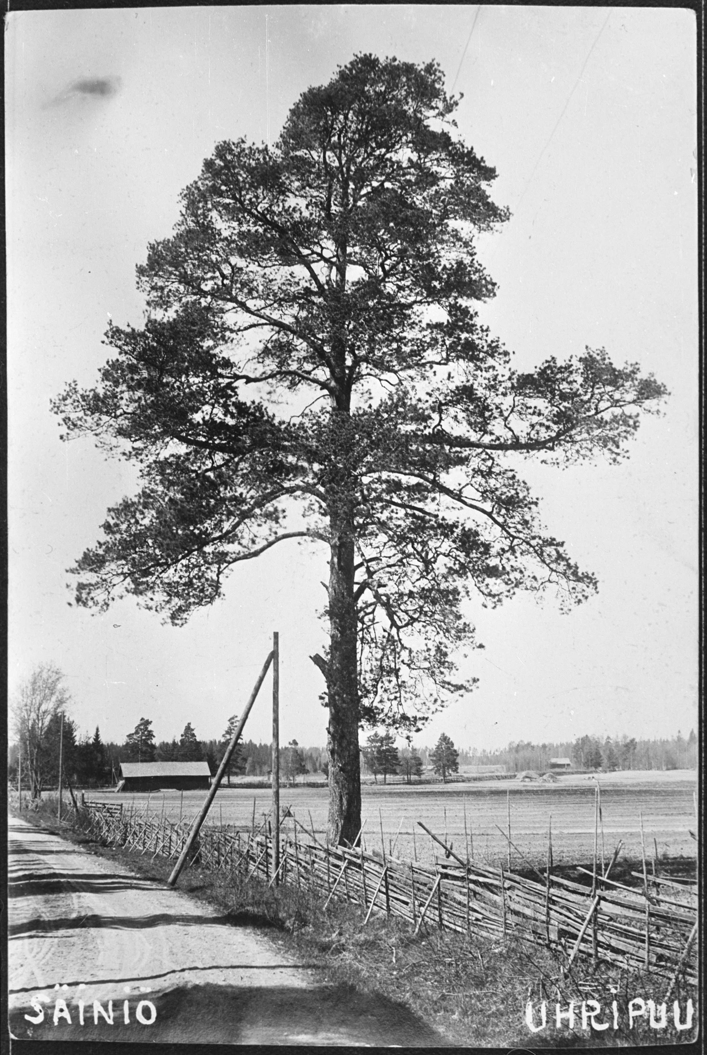 Vanha uhripuu Yläsäiniön kylässä Viipurin maalaiskunnassa 1910–1920-luvulla